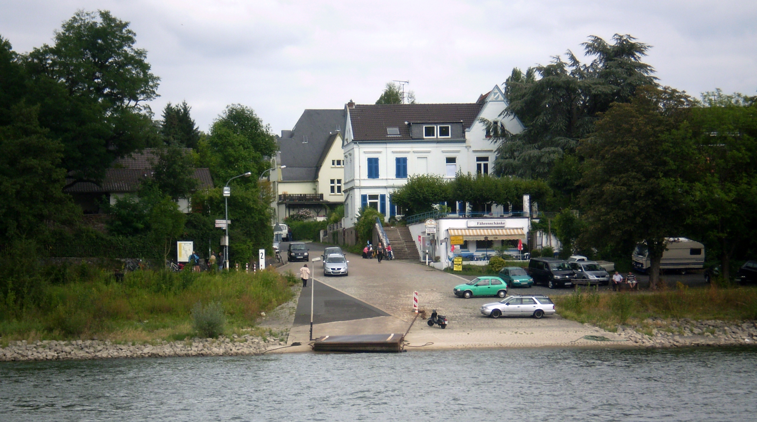 Der Fährplatz Lohfelderfähre der Rheinfähre Bad Honnef–Rolandseck, Rheinstraße, Bad Honnef